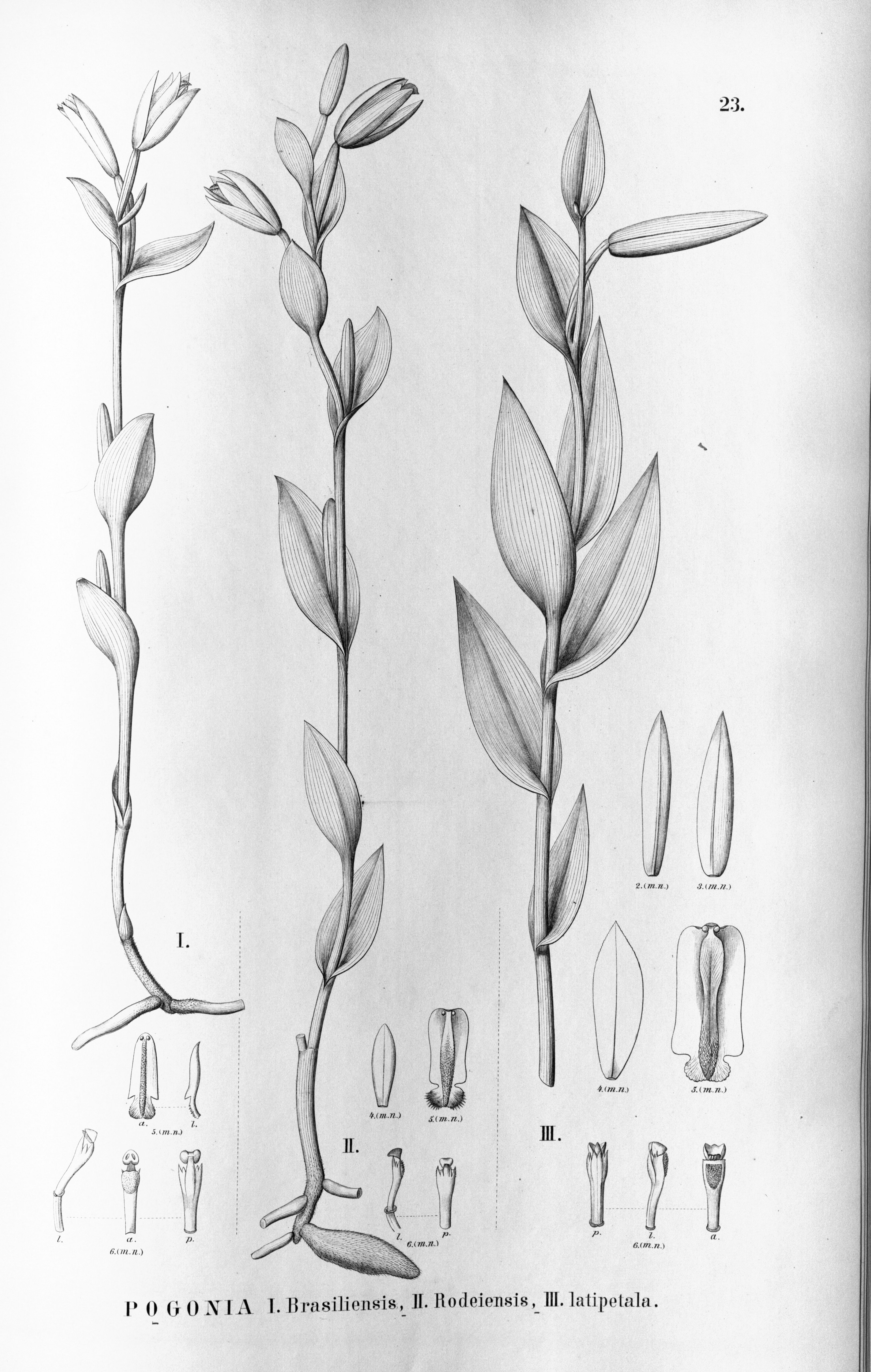 Illustration of : I. Cleistes brasiliensis (as syn. Pogonia brasiliensis) II. Cleistes rodeiensis (as syn. Pogonia rodeiensis) III. Cleistes latipetala (as syn. Pogonia latipetala)